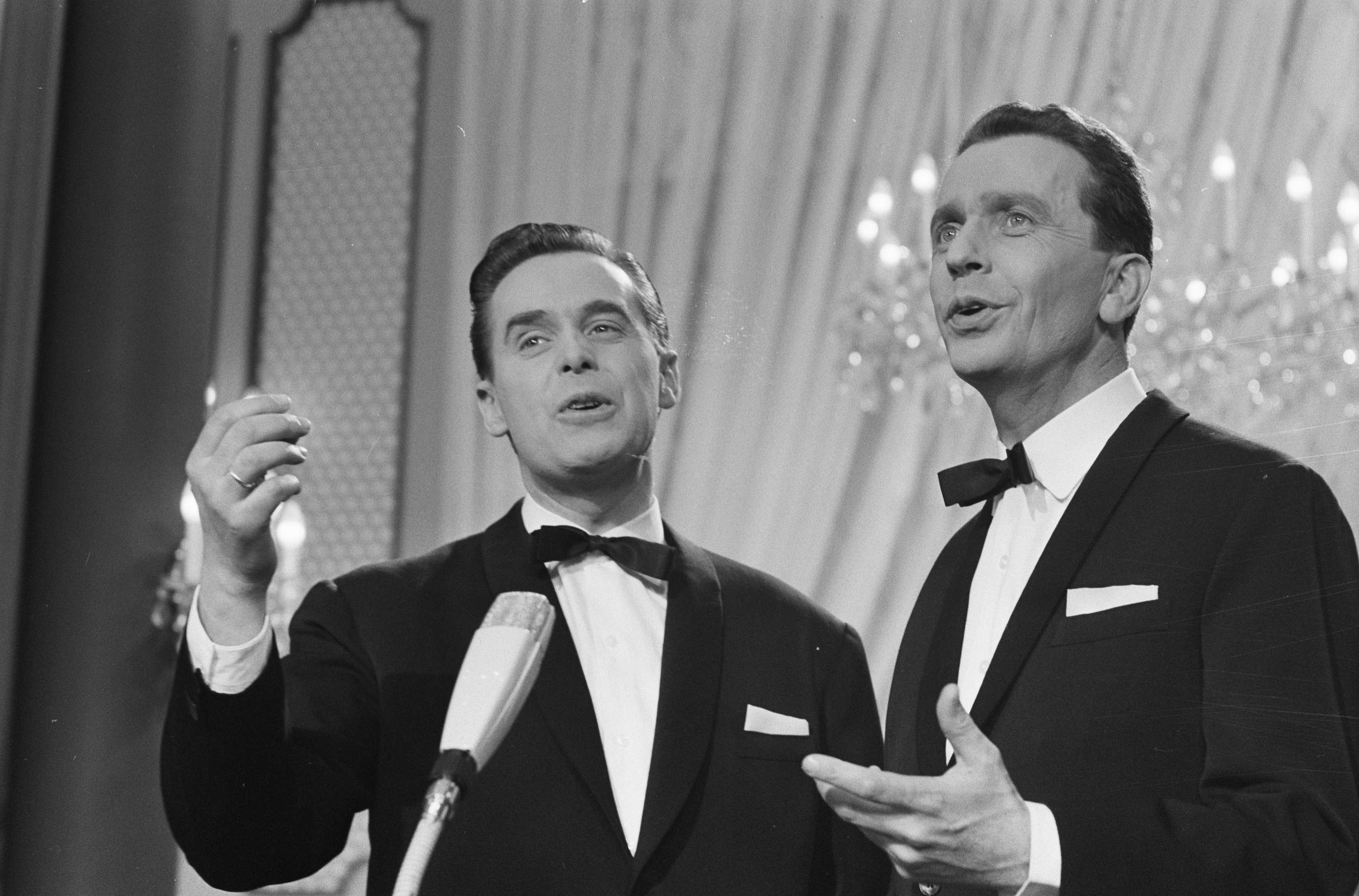 Collectie / Archief : Fotocollectie Anefo Reportage / Serie : [ onbekend ] Beschrijving : Eurovisie Songfestival 1962 te Luxemburg, voor Nederland De Spelbrekers Datum : 18 maart 1962 Locatie : Luxemburg Trefwoorden : artiesten, muziek, songfestivals Instellingsnaam : Spelbrekers Fotograaf : Pot, Harry / Anefo Auteursrechthebbende : Nationaal Archief Materiaalsoort : Negatief (zwart/wit) Nummer archiefinventaris : bekijk toegang 2.24.01.05 Bestanddeelnummer : 913-6590 Reacties Geplaatst door Maaike op 19 juli 2012 - 20:48. De Spelbrekers met het liedje Katinka, wat geen enkel punt kreeg toegekend. (De Spelbrekers zijn de heren / zangers Theo Rekkers en Huug Kok)